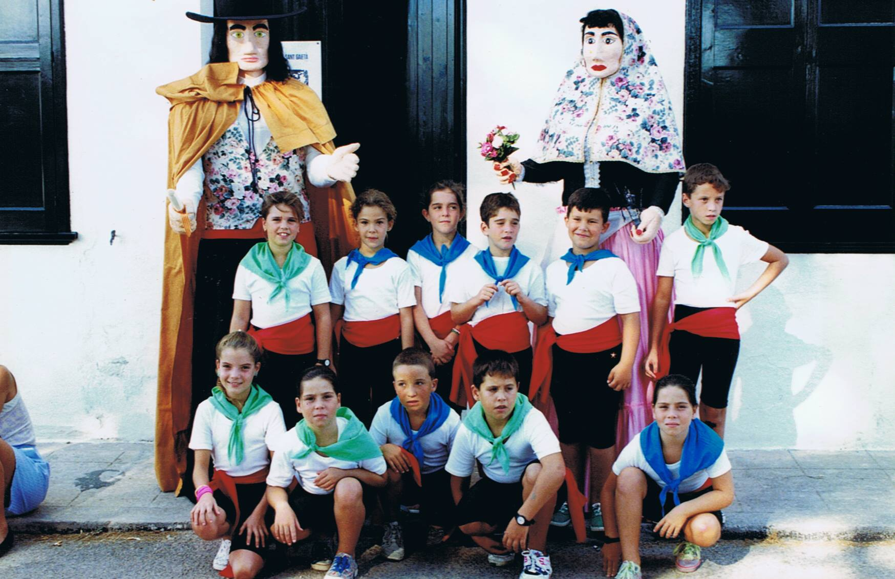 Colla d'amics Geganters de Llucmaçanes